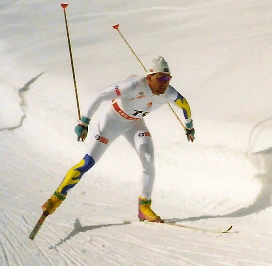 Torgny Mogren lors du 50 km hommes des J.O. d'Alberville, le 22 février 1992.